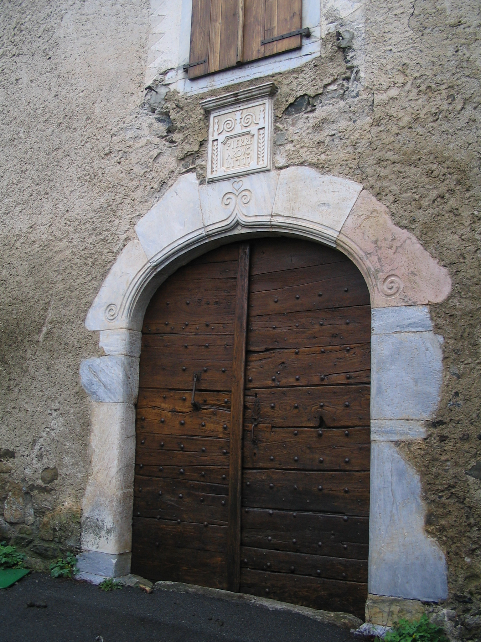 Porche d'entrée de la maison de Pierrine Gaston Sacaze - Hameau de Bagès - Pyrénées Atlantiques - France Auteur: P.Charpiat 2007